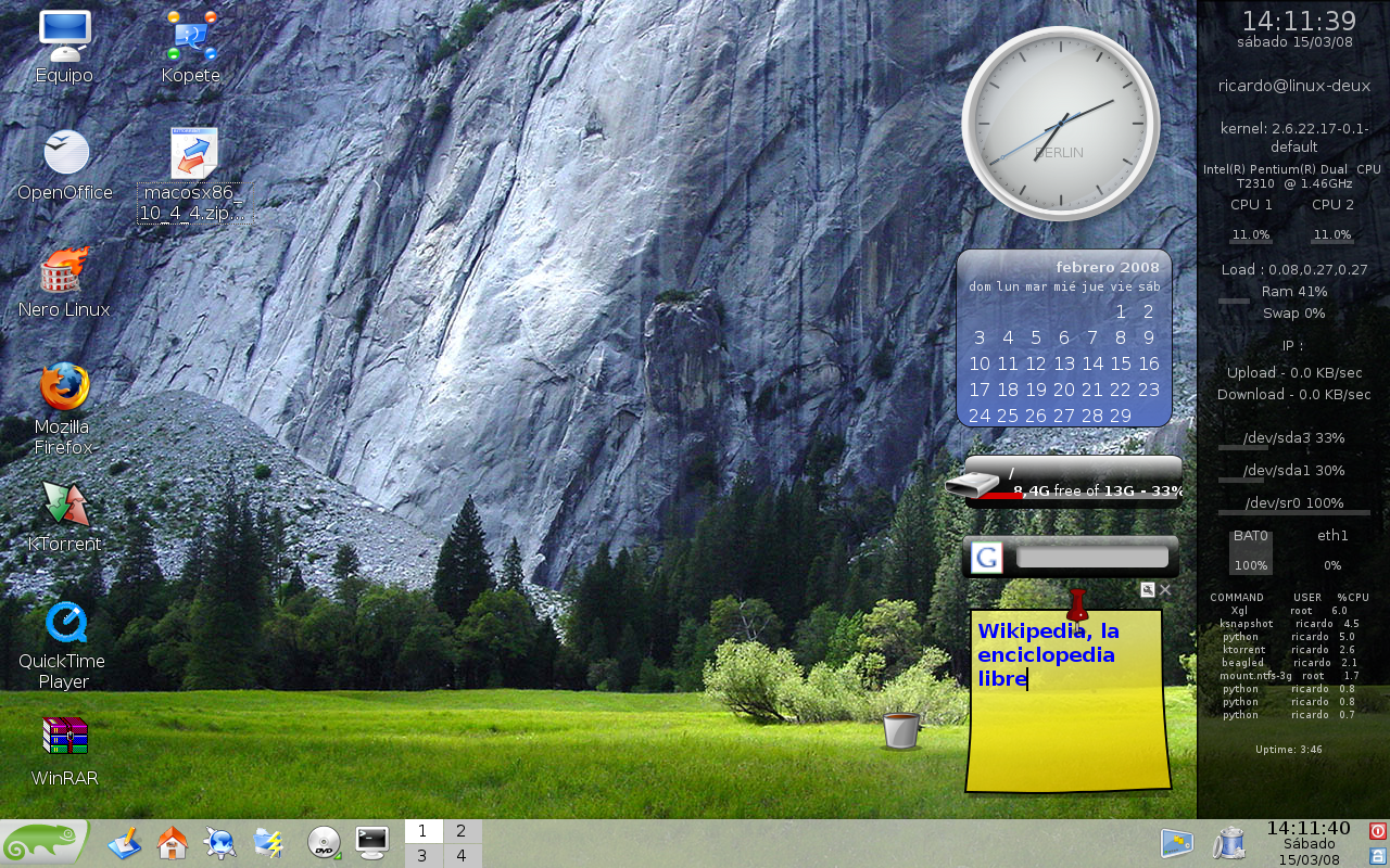 openSUSE 10.3 - Screenlets